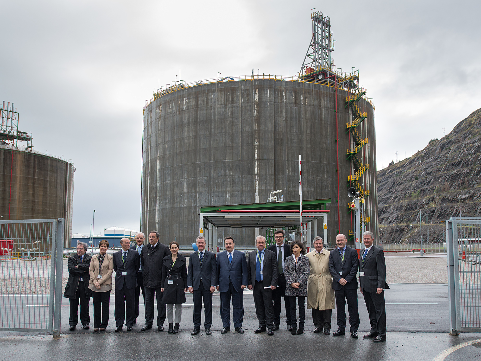 Lehendakariak Bahía de Bizkaia Gasen tanga berria inauguratu du